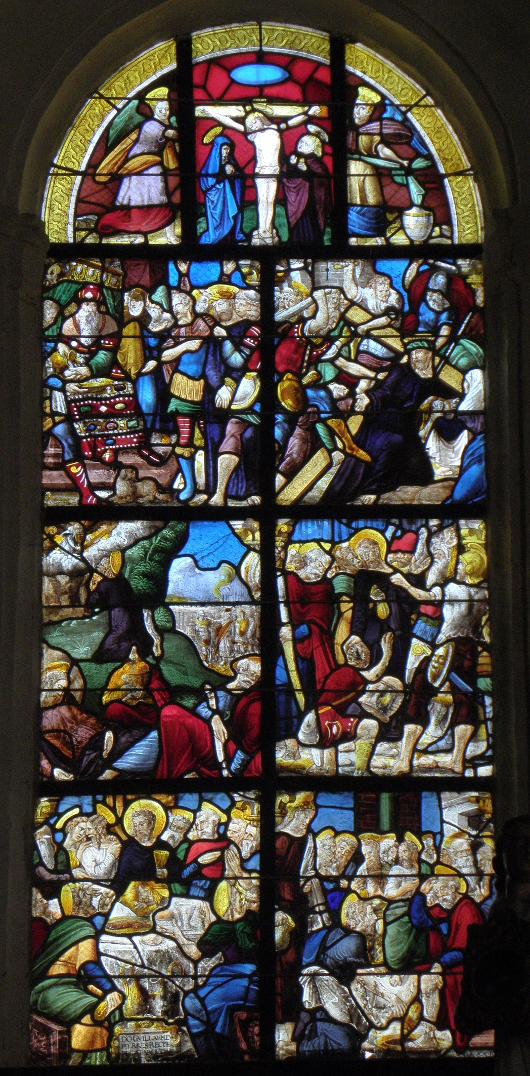 Baie 01 de l'église Notre-Dame et Saint-Bieuzy de Bieuzy (56).